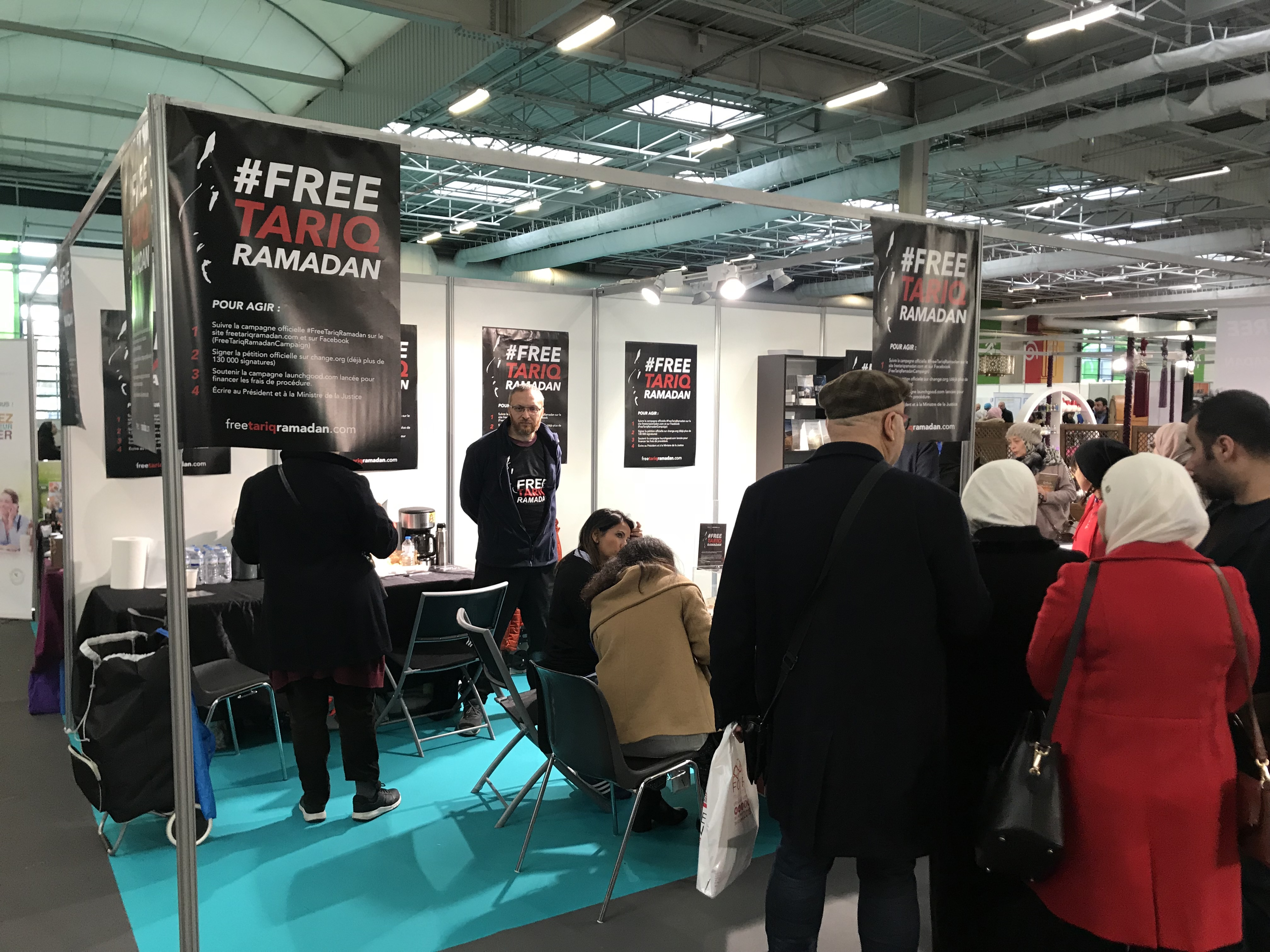 Stand Free Tariq Ramadan, à la Rencontre Annuelle des Musulmans de France, 30 mars-2 avril 2018.